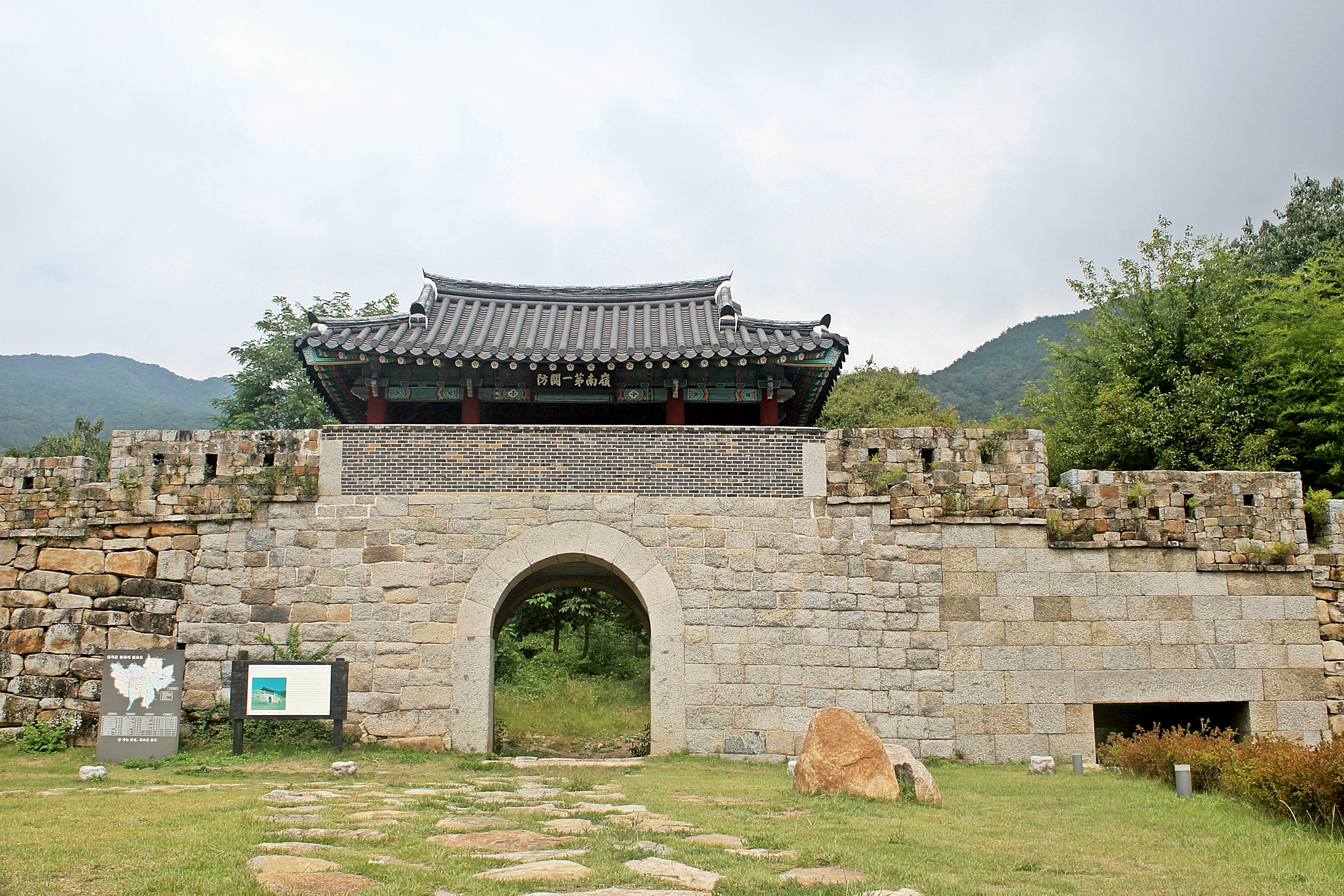 조선시대에 축조된 석축산성 *가산산성 *